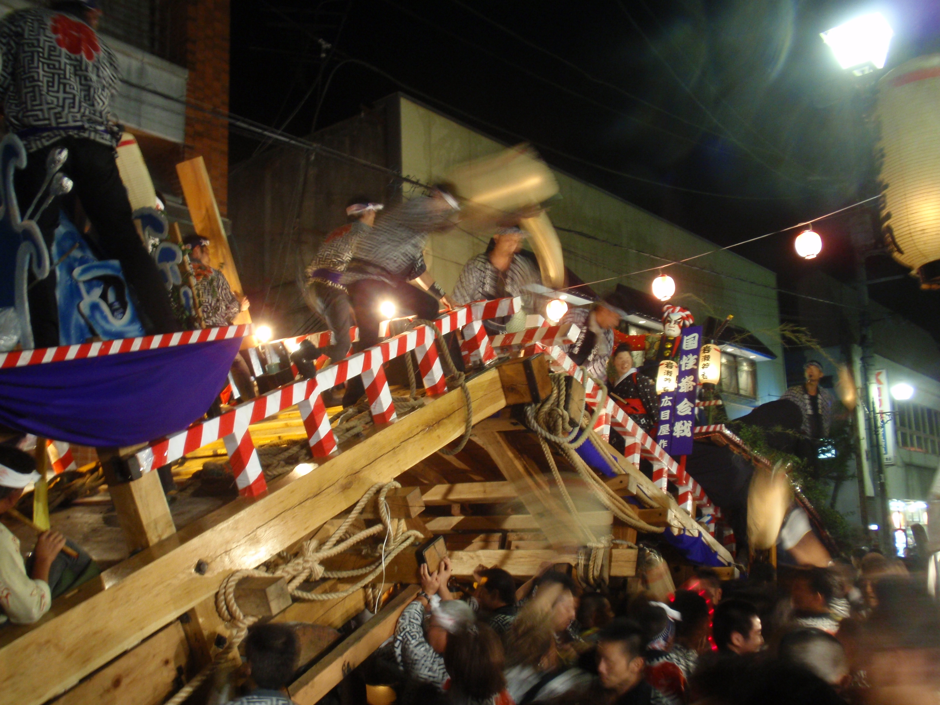 角館のお祭り。人物の顔ボカシ修正。